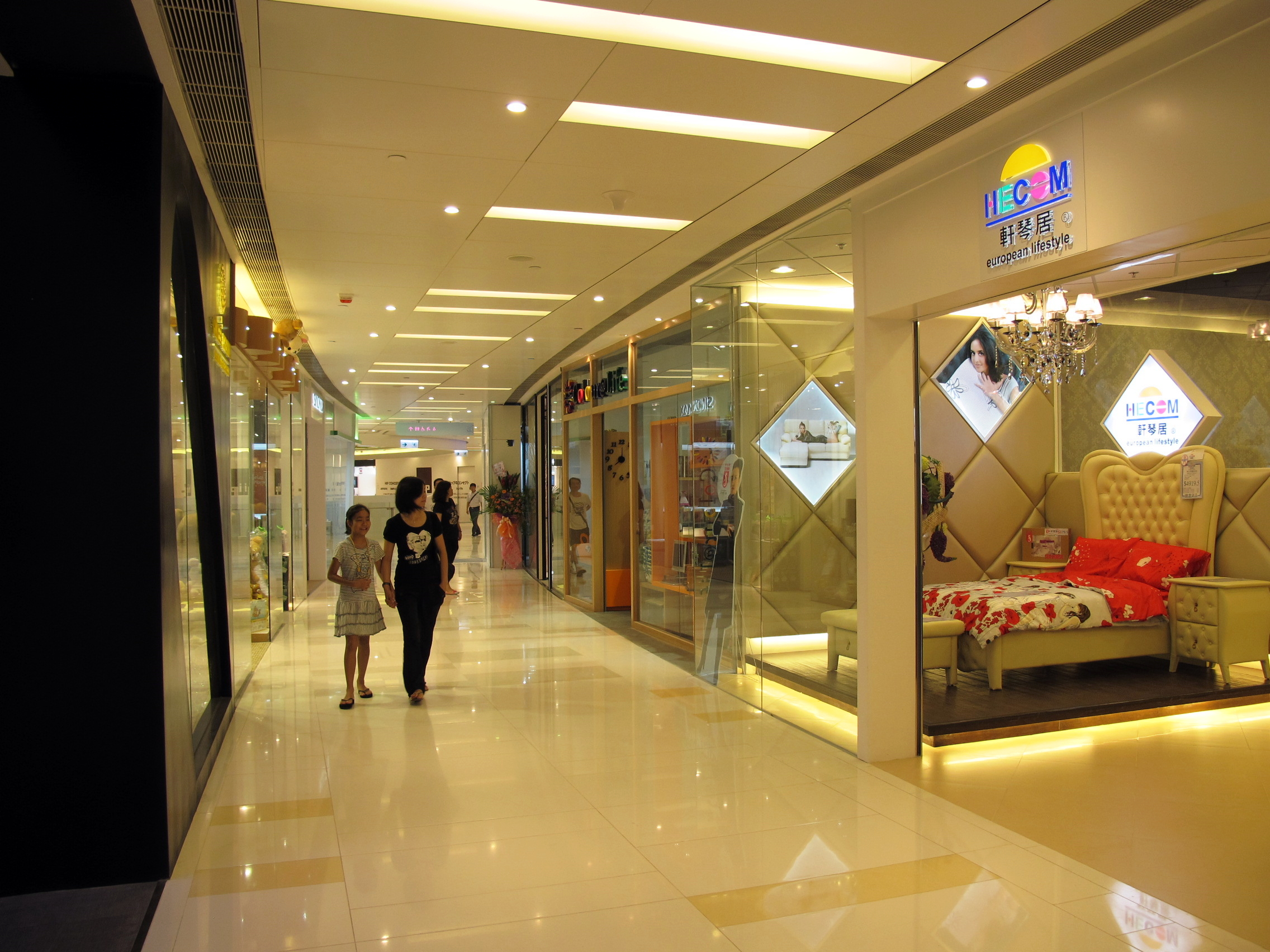 Mikiki Mall Level 1 Access